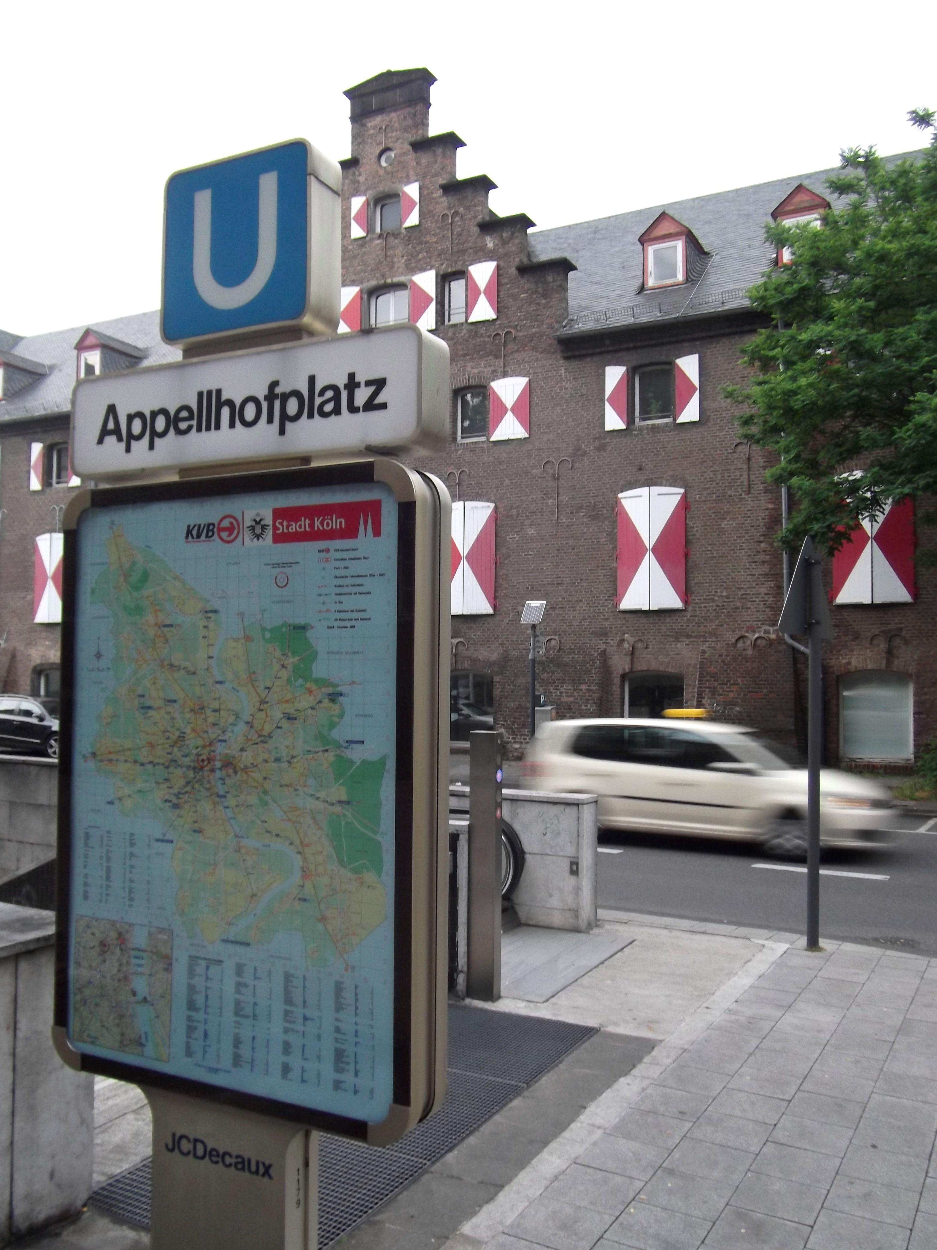 Cologne (Köln); Germany: Köln-Altstadt-Nord: U-Bahn Appellhofplatz @ Zeughaus